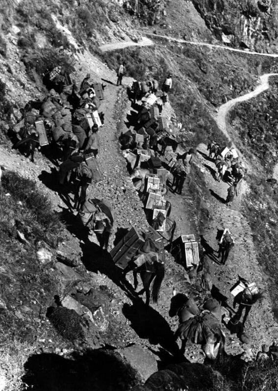 Karawane und Gelände zwischen Tschangu und Natula